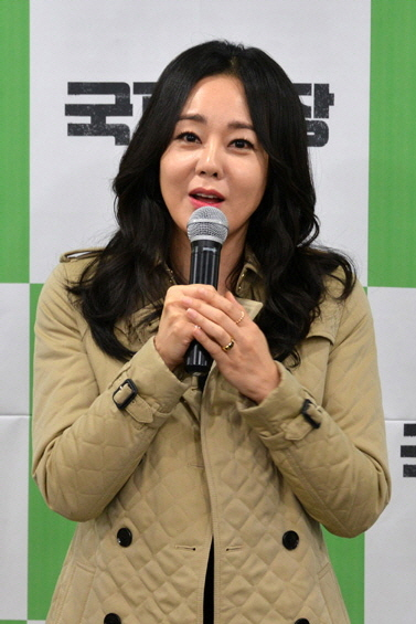 초록우산 어린이재단 김윤진 홍보대사 기부금 전달식